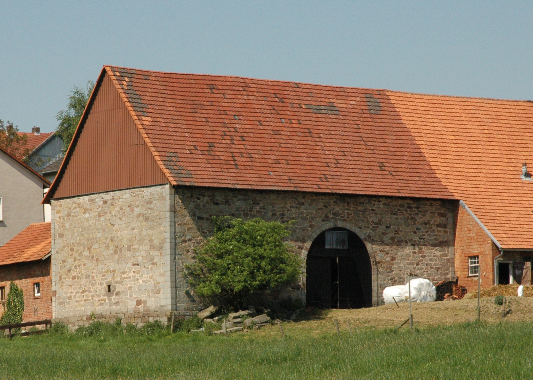 Bild der Zehntscheune Unterstoppel (Haunetal, Kreis Hersfeld - Rotenburg), vermutl. 1784. Aufnahmedatum: 14. Mai 2008